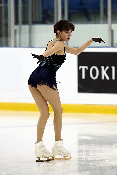 Евгения Медведева на Autumn Classic International 2018 - Короткая программа